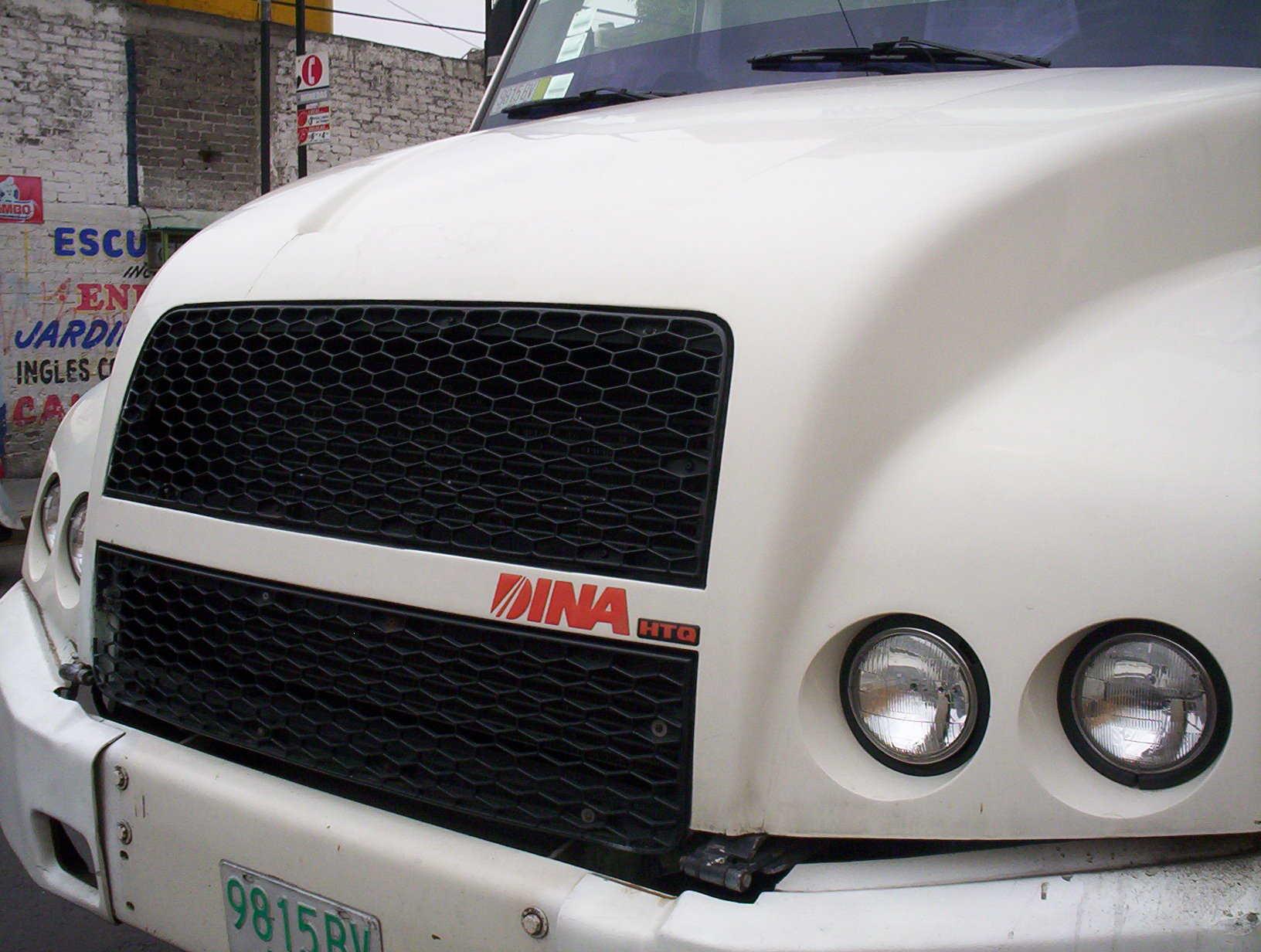 La familia HTQ que son autobuses de carga ligeros, medianos y pesados; está totalmente diseñada para el mercado mexicano y norteamericano en espera a su reintroducción a dichos mercados.